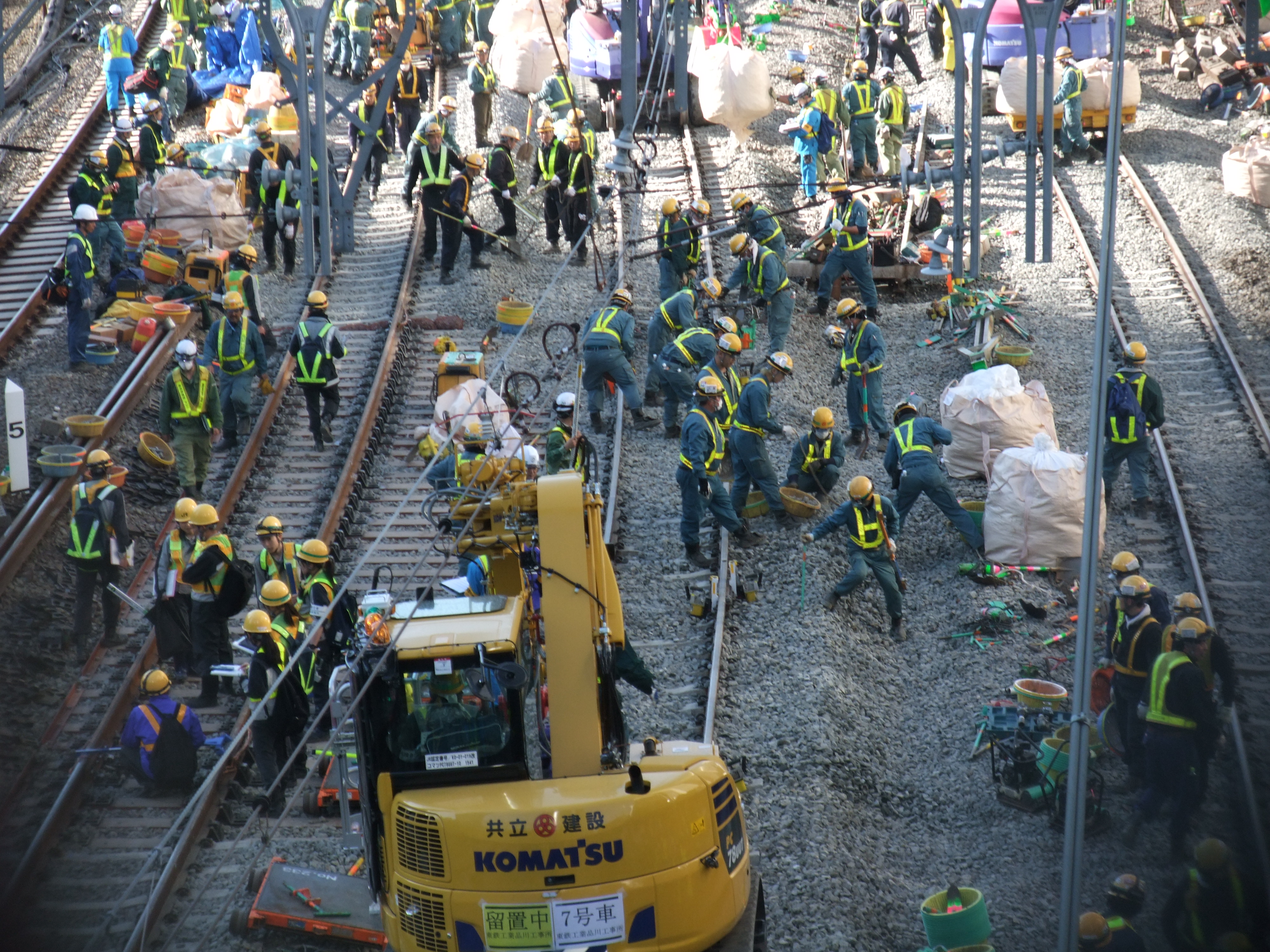 高輪ゲートウェイ駅開設に伴う線路切り替え工事の作業風景。札ノ辻橋上より撮影。